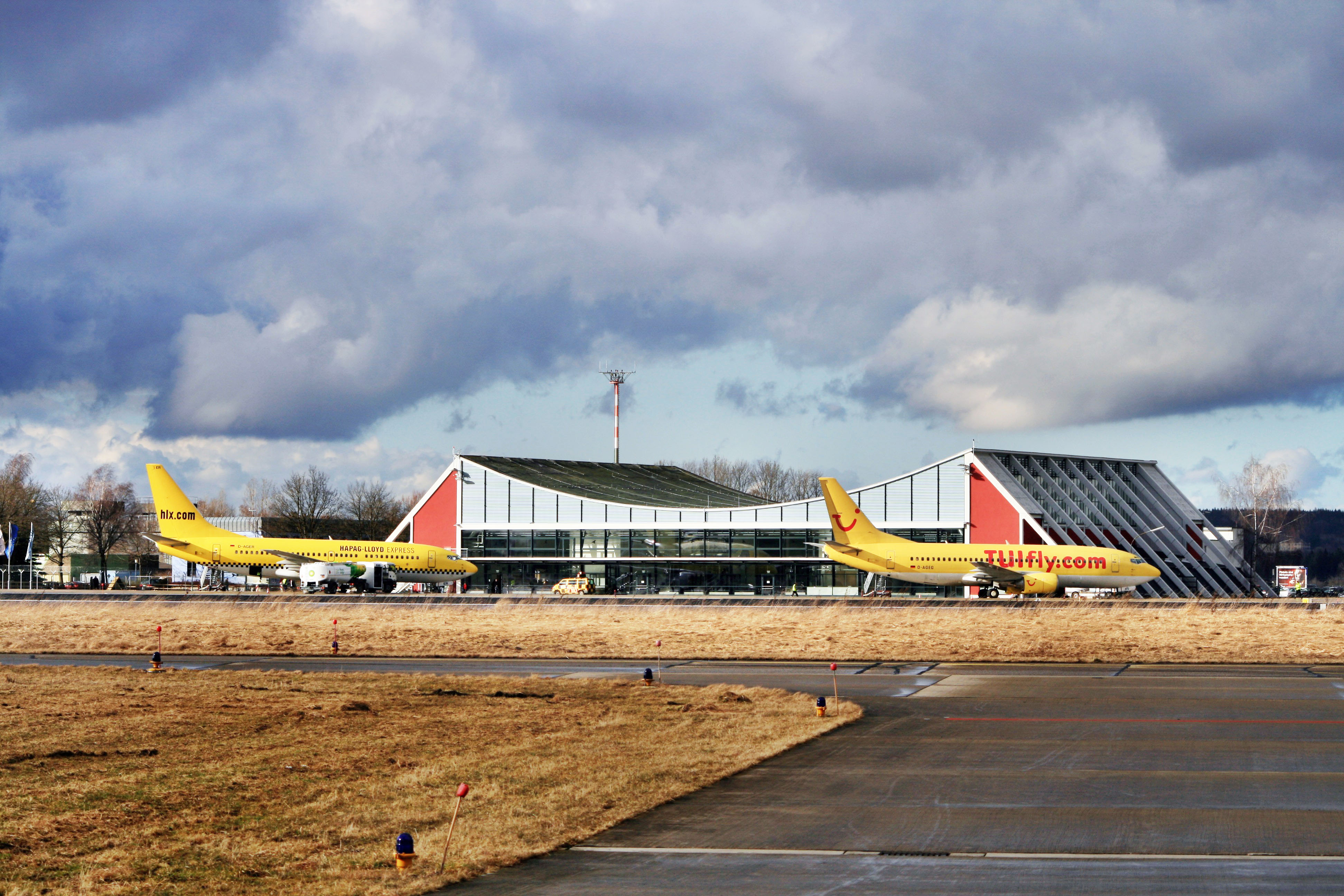 Frontansicht des Allgäu Airports